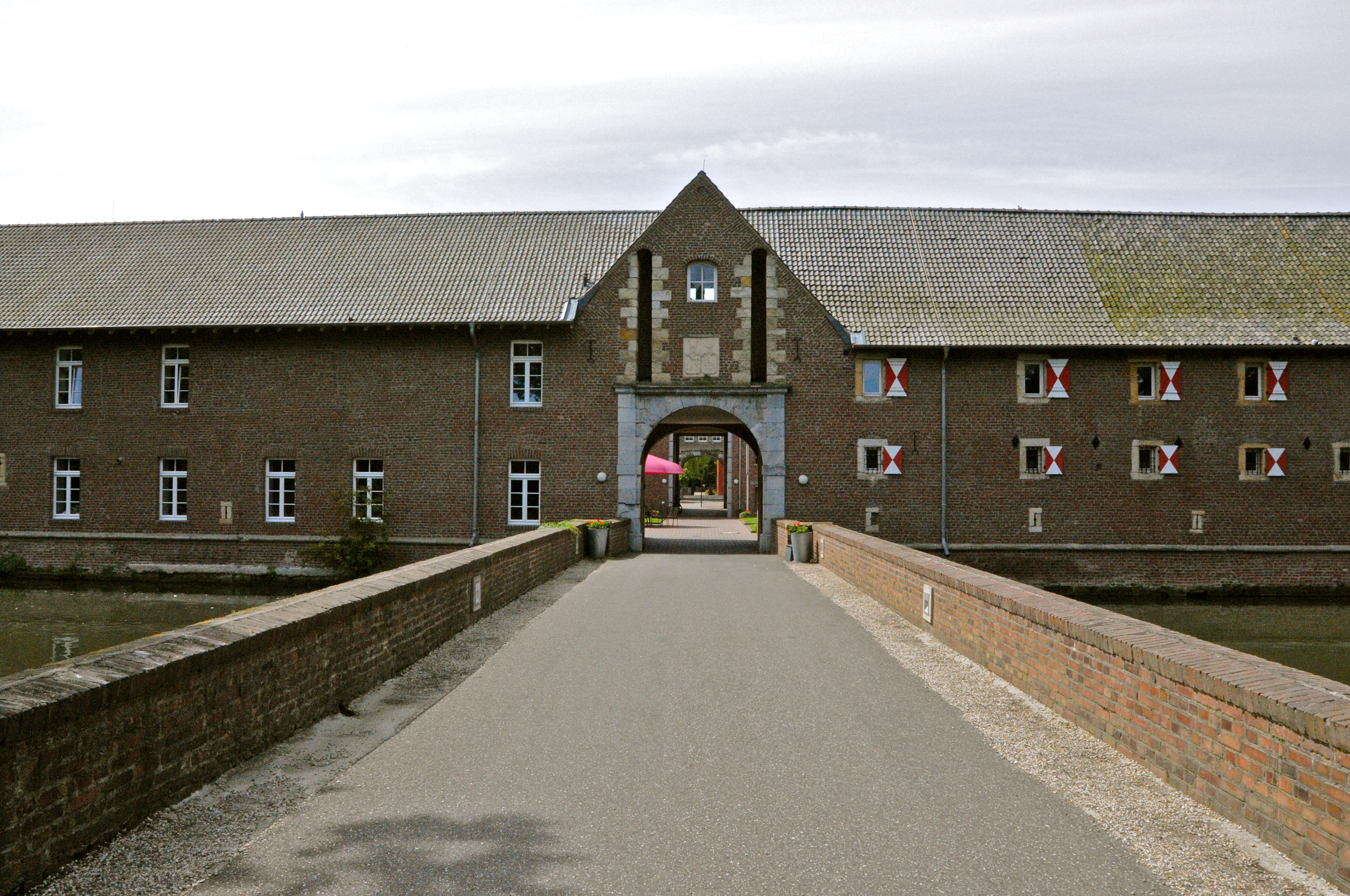 Portal in der Nordostfassade der äußeren Vorburg von Schloss Trips in Geilenkirchen